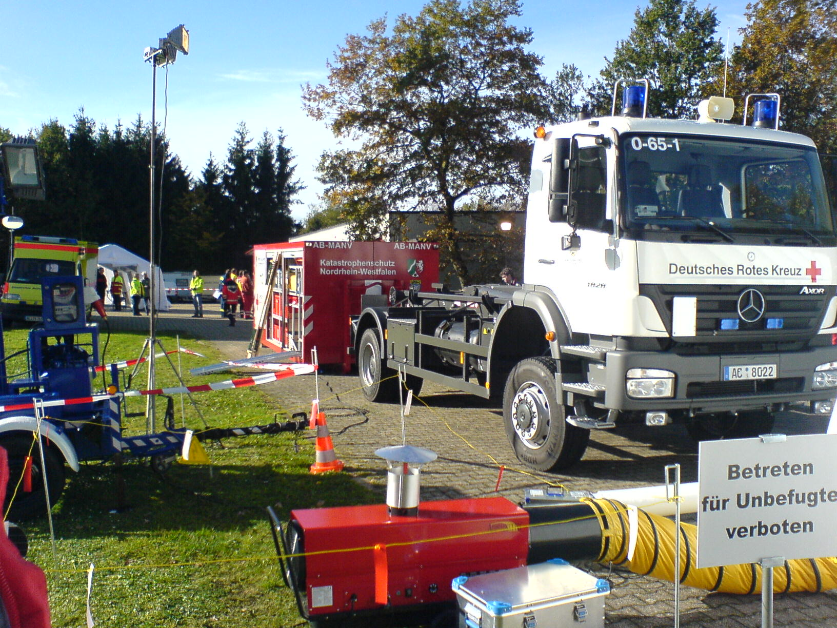 AB-MANV, Kreis Aachen 0-65-1, Deutsches Rotes Kreuz, MANV-Übung